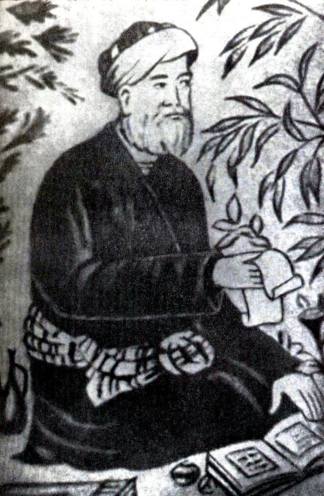 Абдуррахман Джами. Портрет работы Камаладдина Бехзада